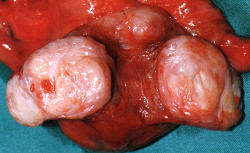 Leiomiomes subserosos uterins.